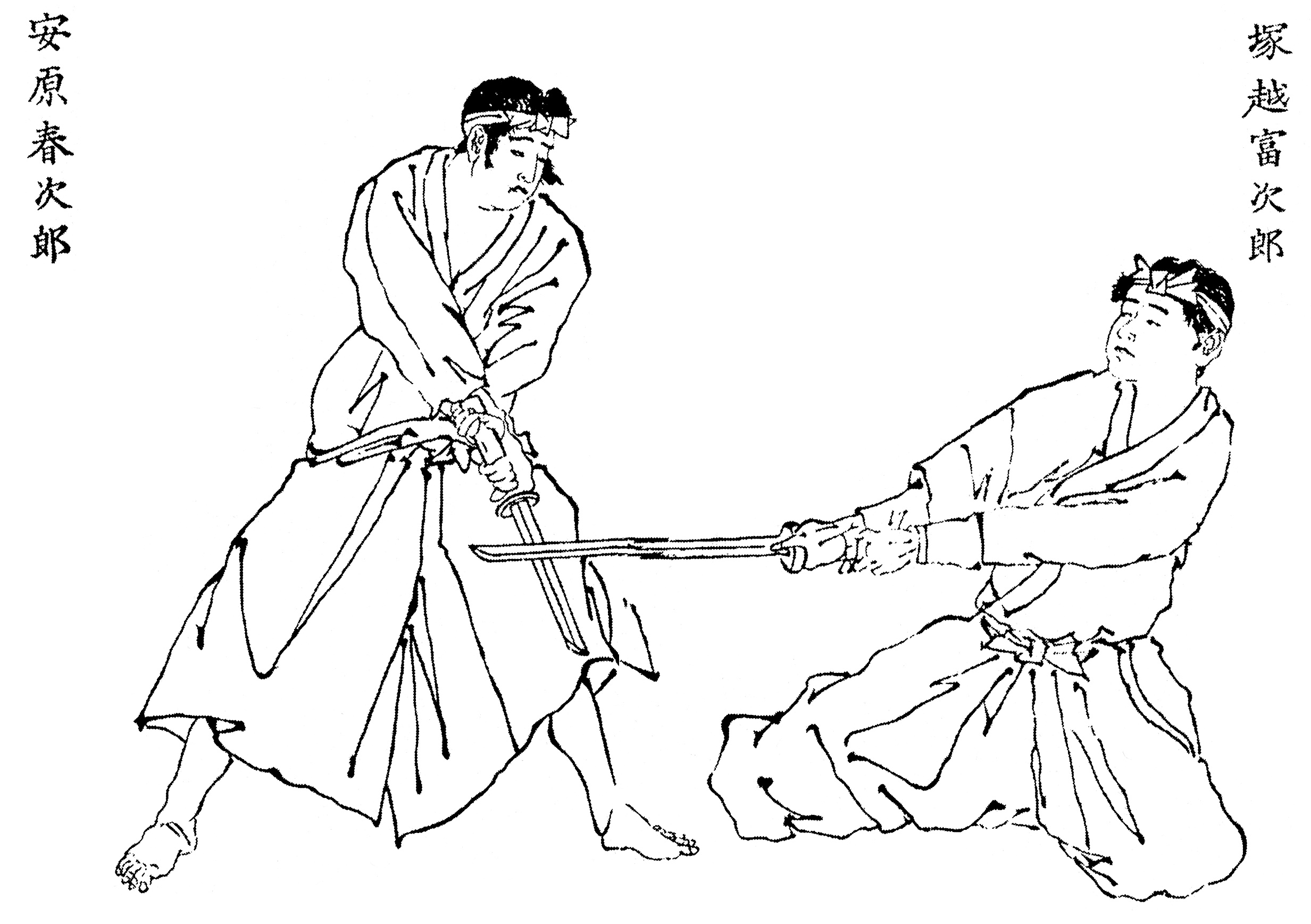 真之神道流柔術の形「奏者捕」